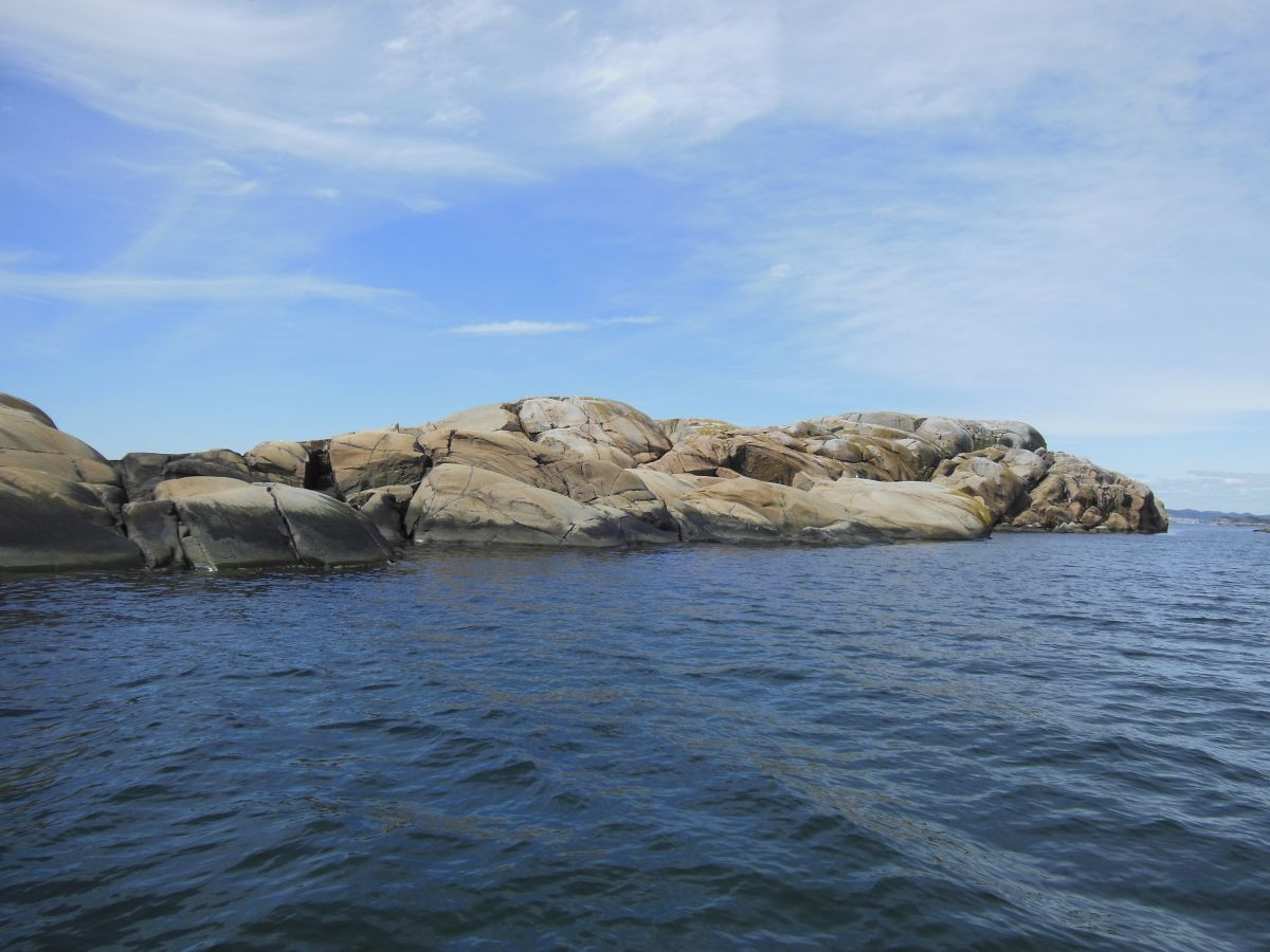 Ferjeholmen har blankskurte svaberg av syenitt.